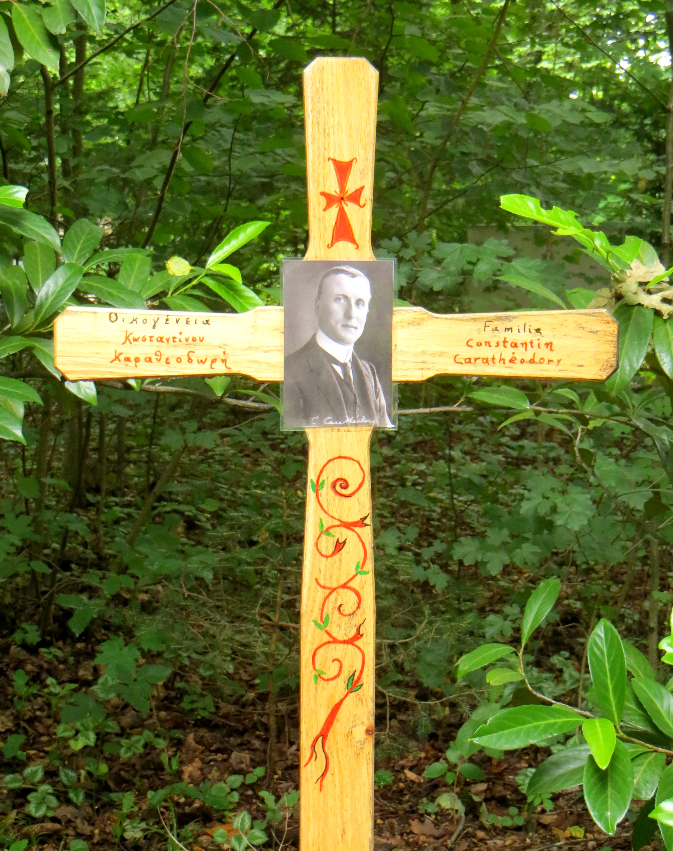 Grabmal des Mathematikers Constantin Carathéodory (* 13. September 1873 in Berlin, † 2. Februar 1950 in München) auf dem Münchner Waldfriedhof (Grabfeld 303).